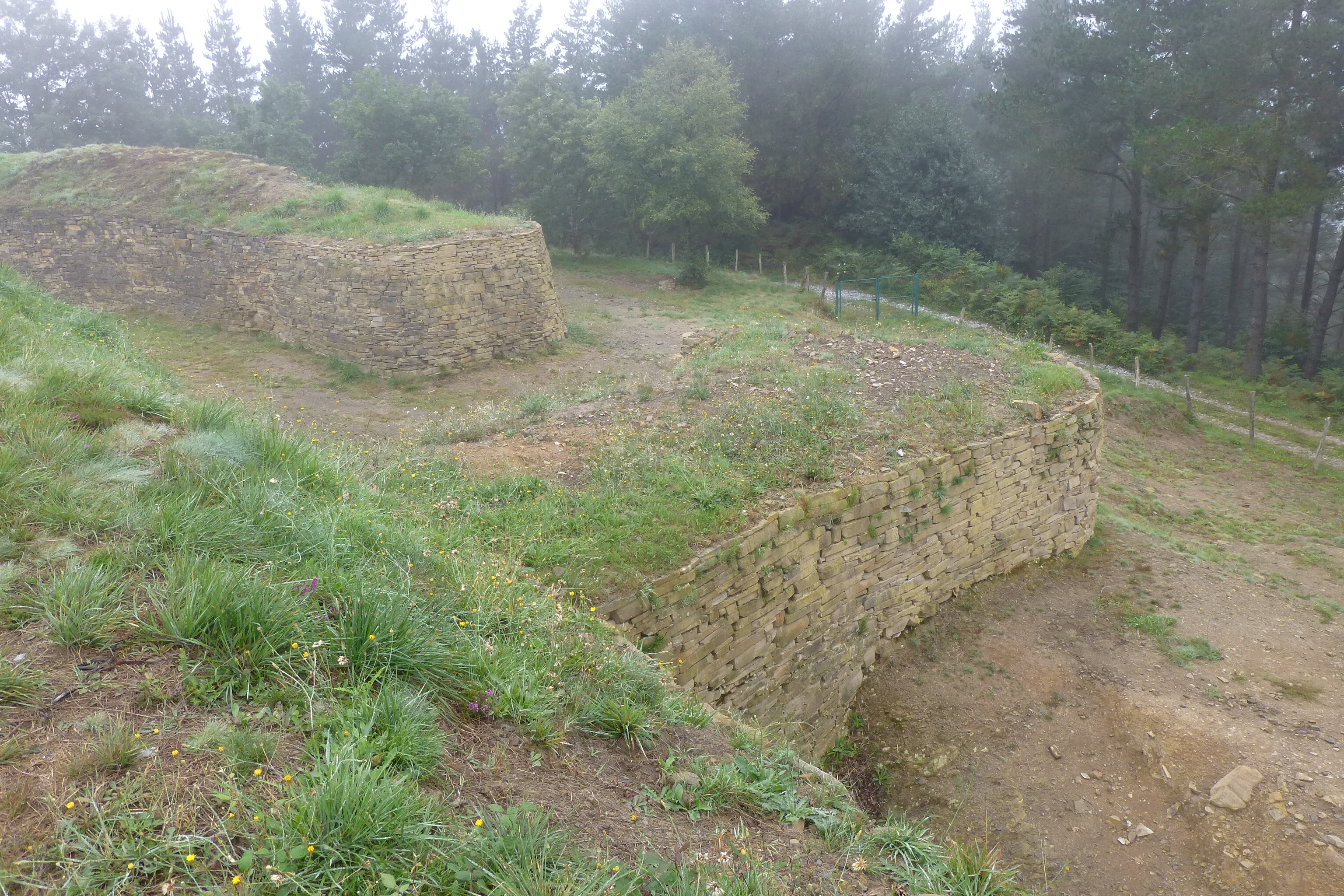 Castro de Arrola u oppidum de Marueleza en Bizkaia, País vasco (España). Extremo NNW, acceso.